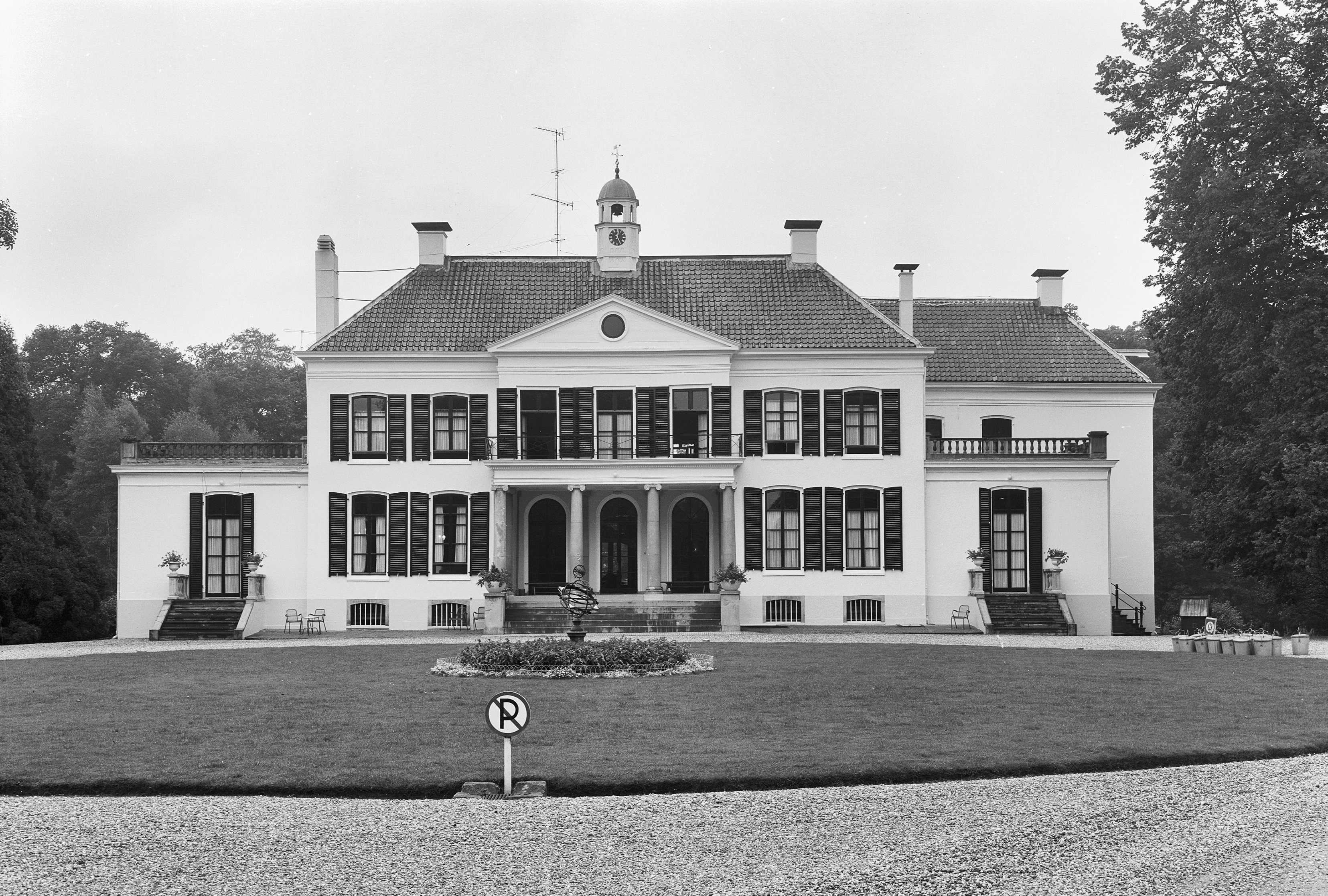 Engelenburg", voorgevel